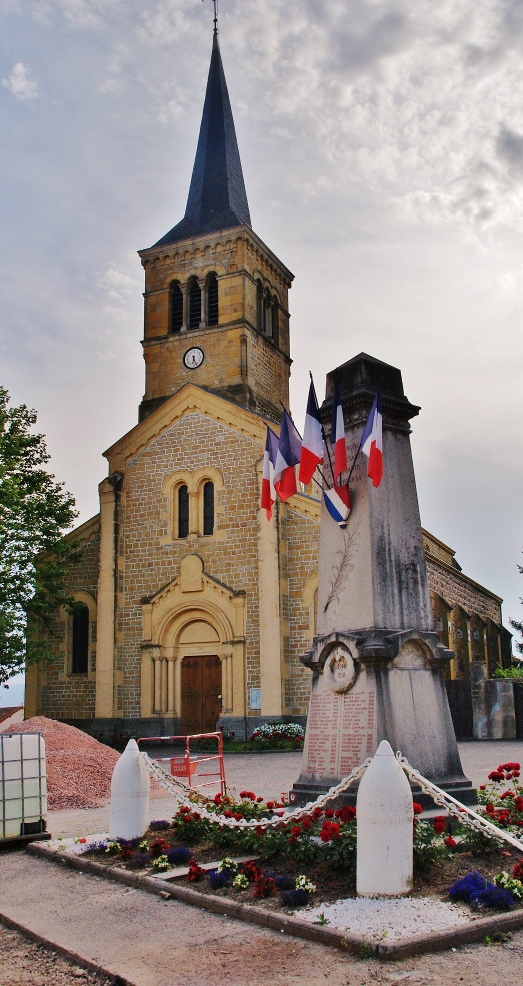 église St Pierre et le Monument-aux-Morts